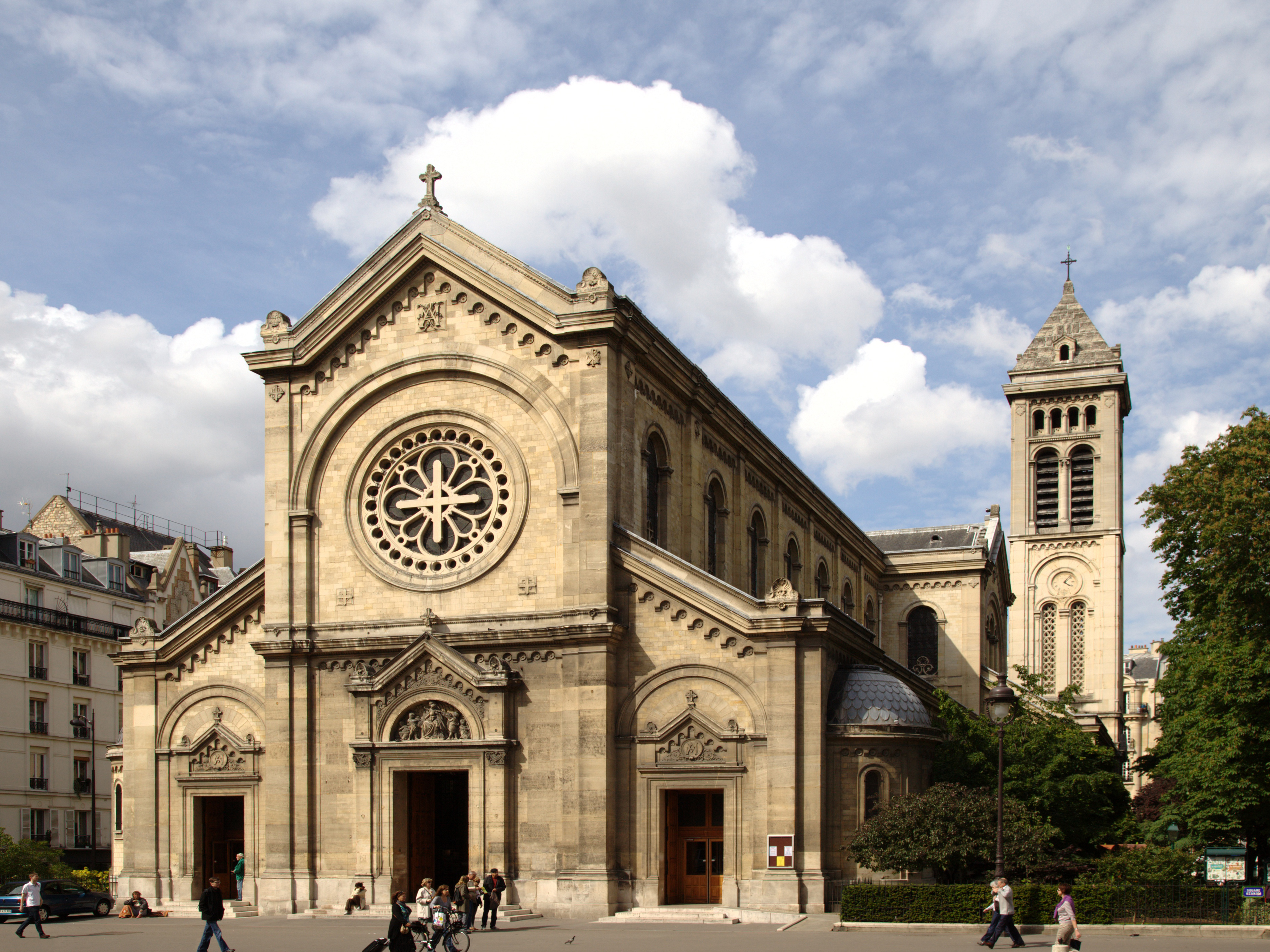 L'église Notre Dame des Champs à Paris, vue depuis le boulevard Montparnasse.